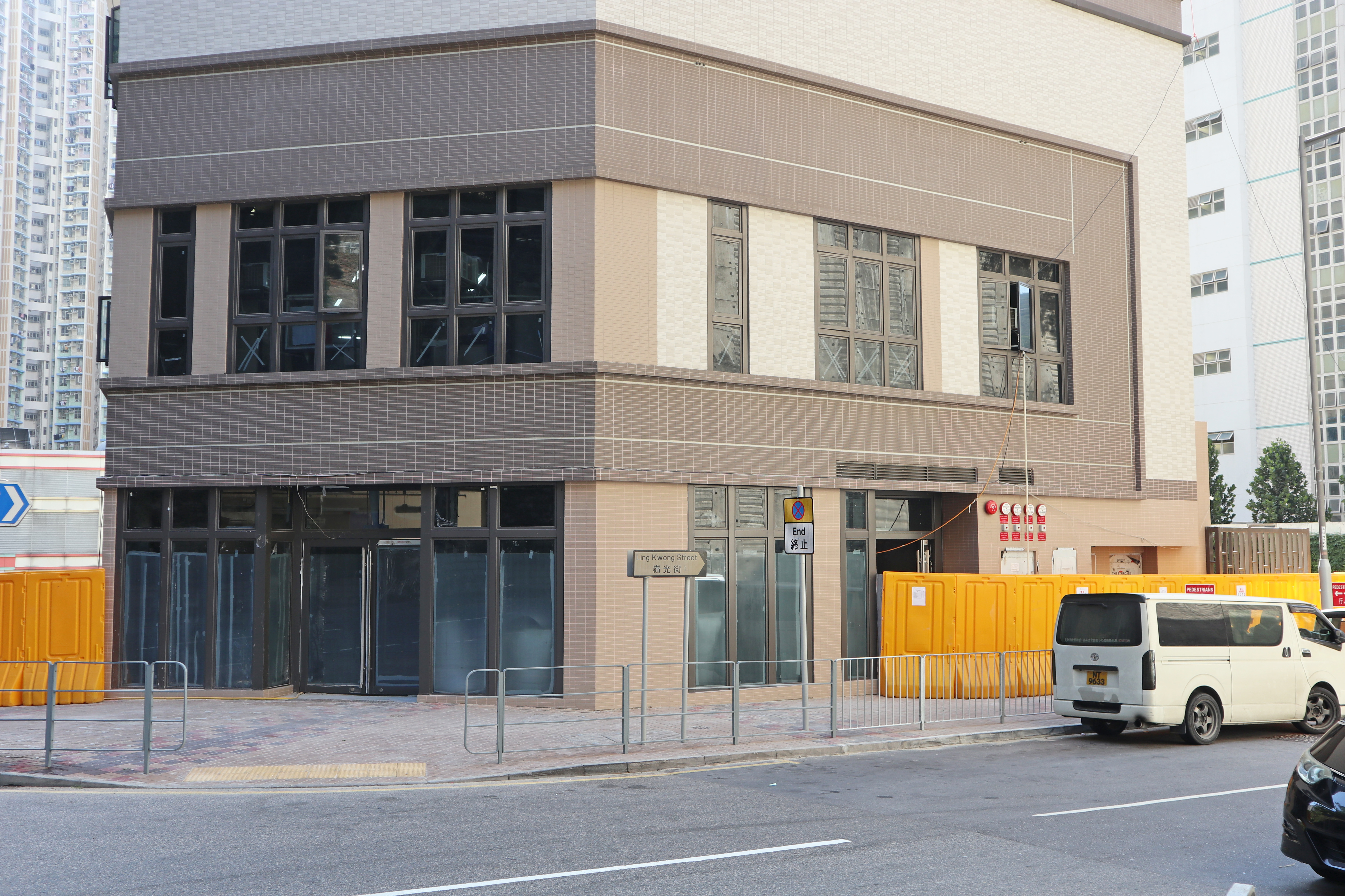 調景嶺翠嶺峰嶺光街一方的入口